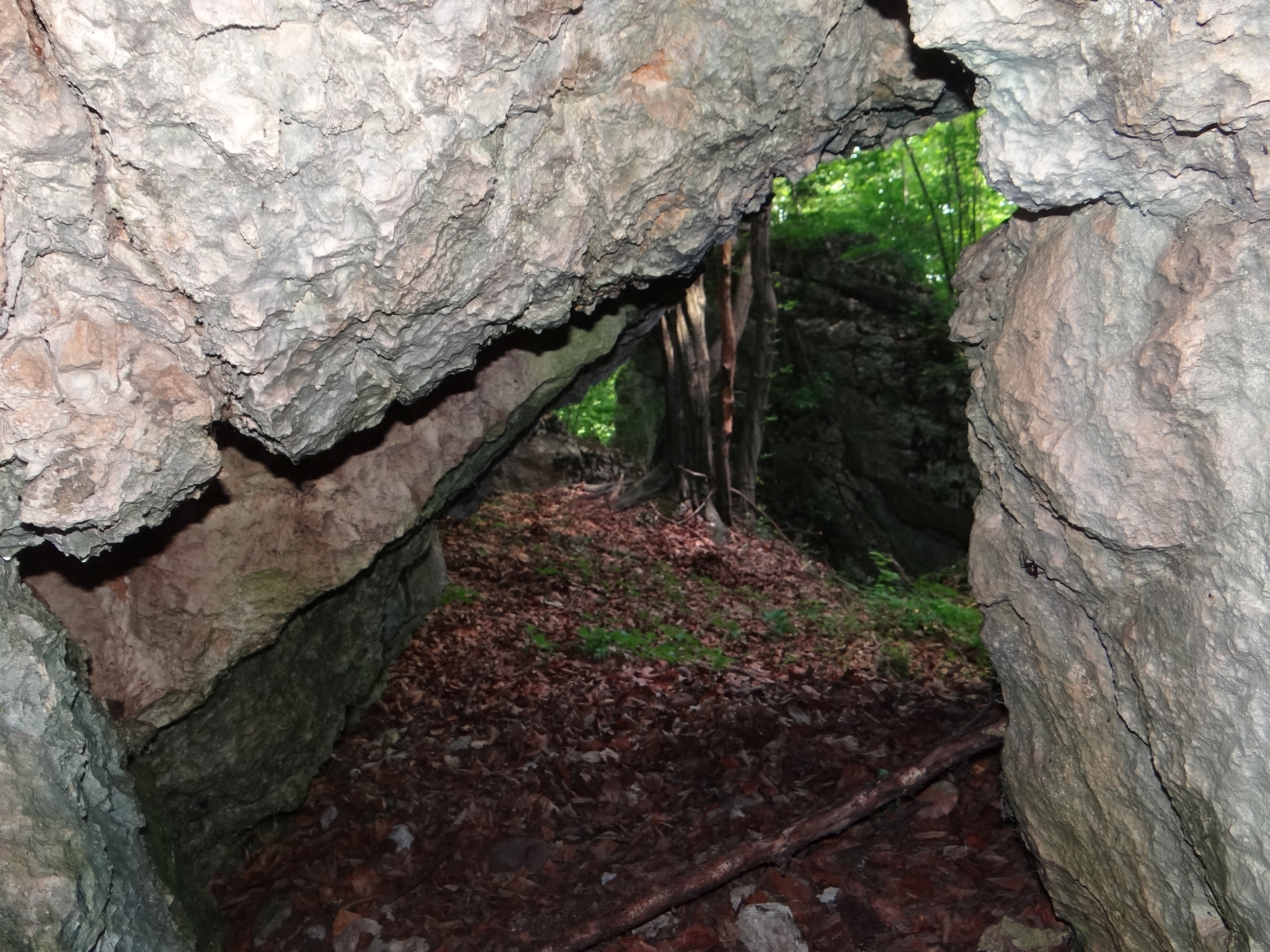 Korytarz w Krętych Skałach w Dolinie Szklarki